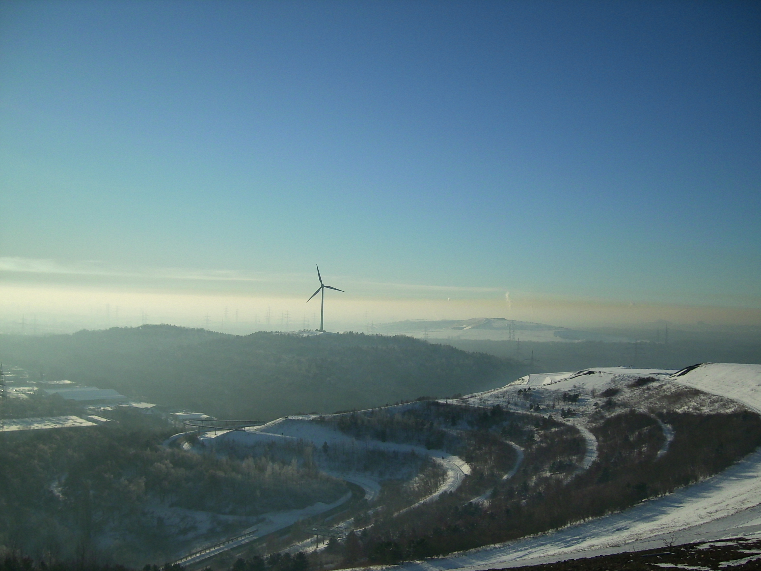 Halde Hoheward im Winter